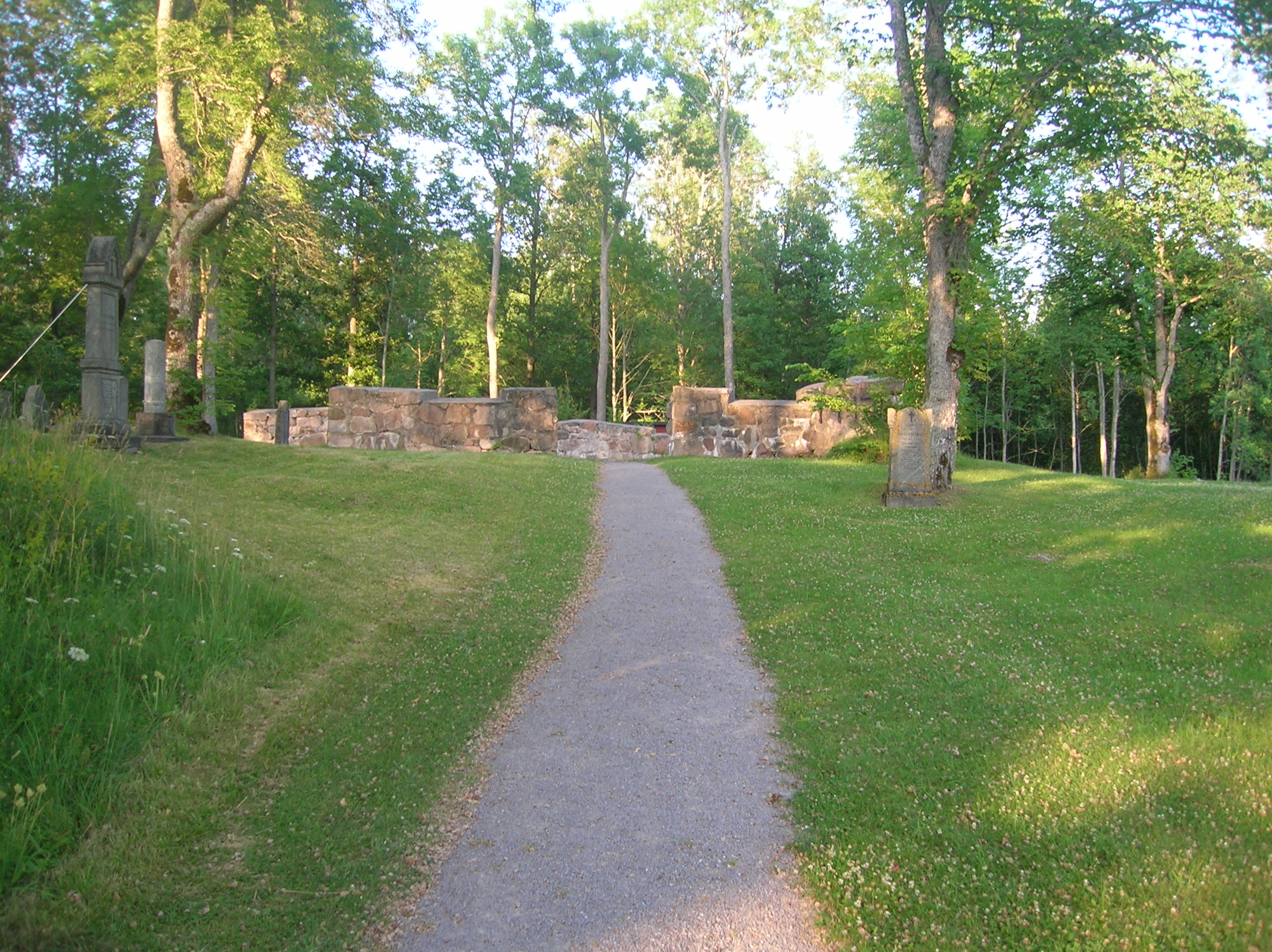 The ruins of Krokeks konvent/Krokeks ödekyrkogård north of Krokek, Norrköping municipality, Sweden